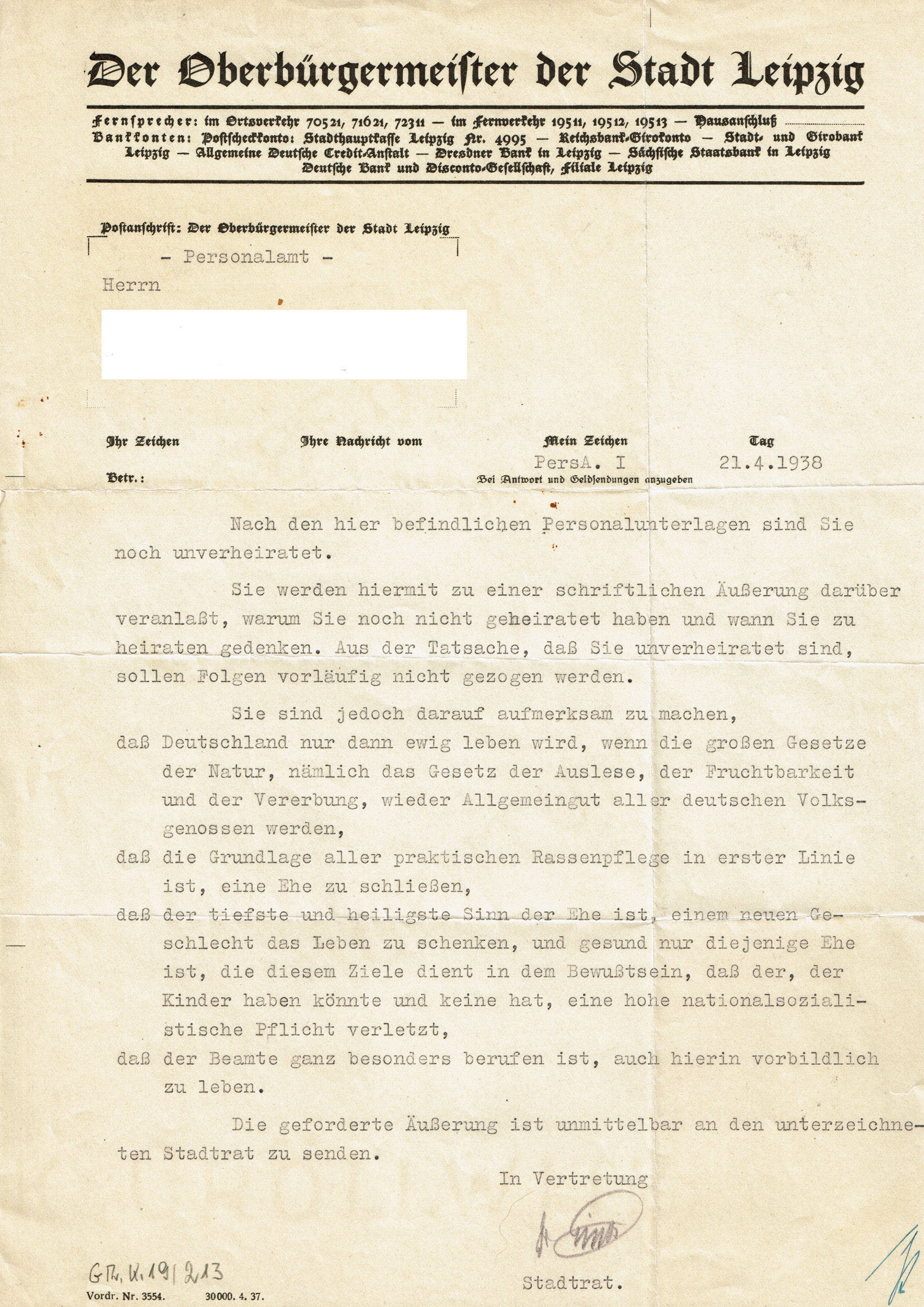 Schreiben Kurt Lissos als Leiter des Personalamts an einen Mitarbeiter des Fürsorgeamtes der Stadt Leipzig (1938)